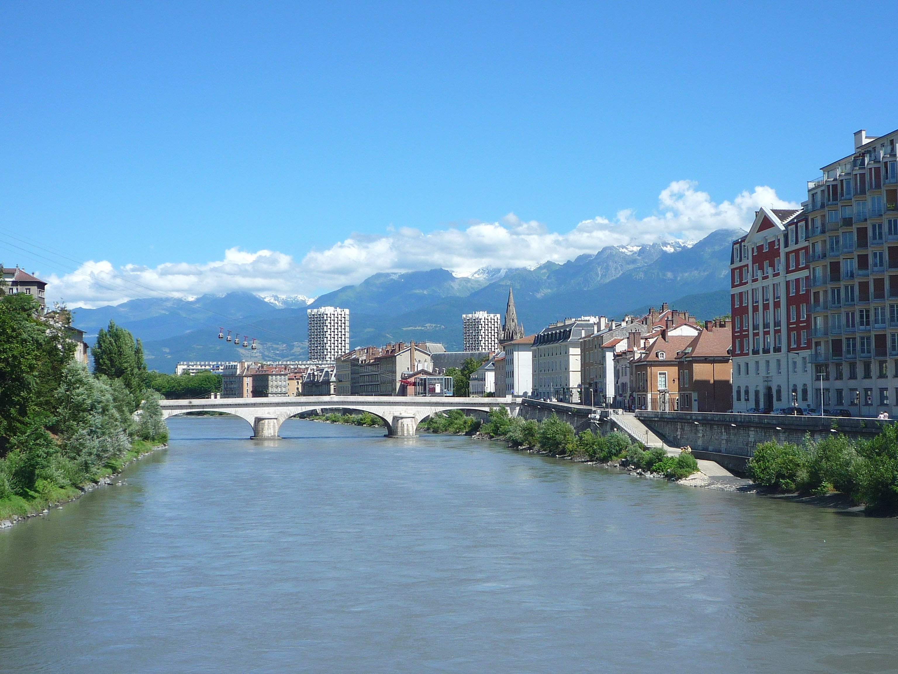 Pont Marius Gontard - Grenoble